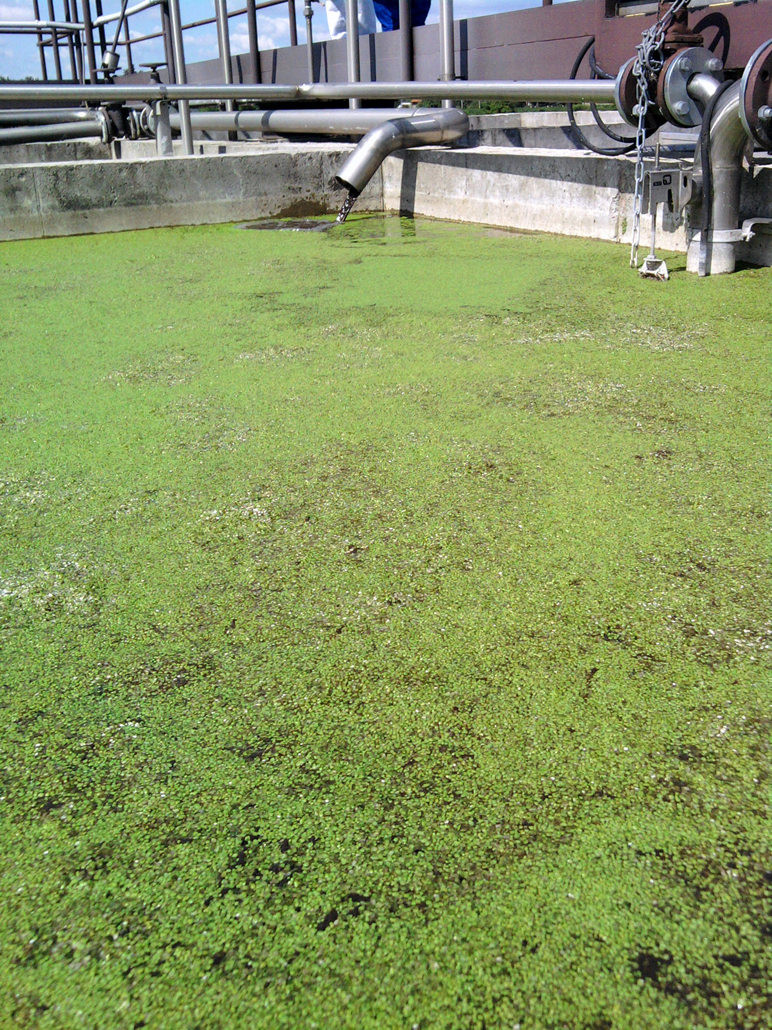 Tisztítóállomás , Szlovákia